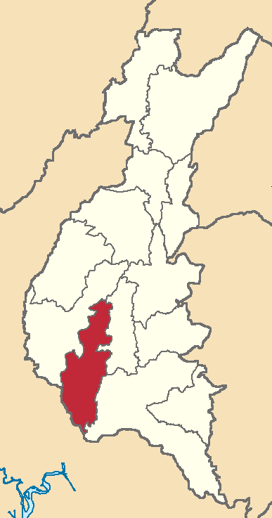 Mapa localizador del cantón en Los Ríos, Ecuador